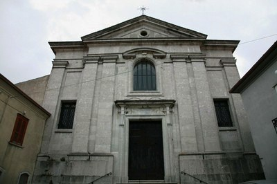 Cattedrale di Frigento (AV)